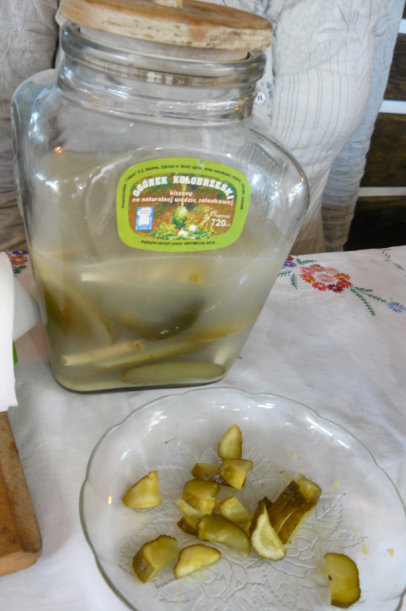 Smaki Regionów - Poznań. 2015r.